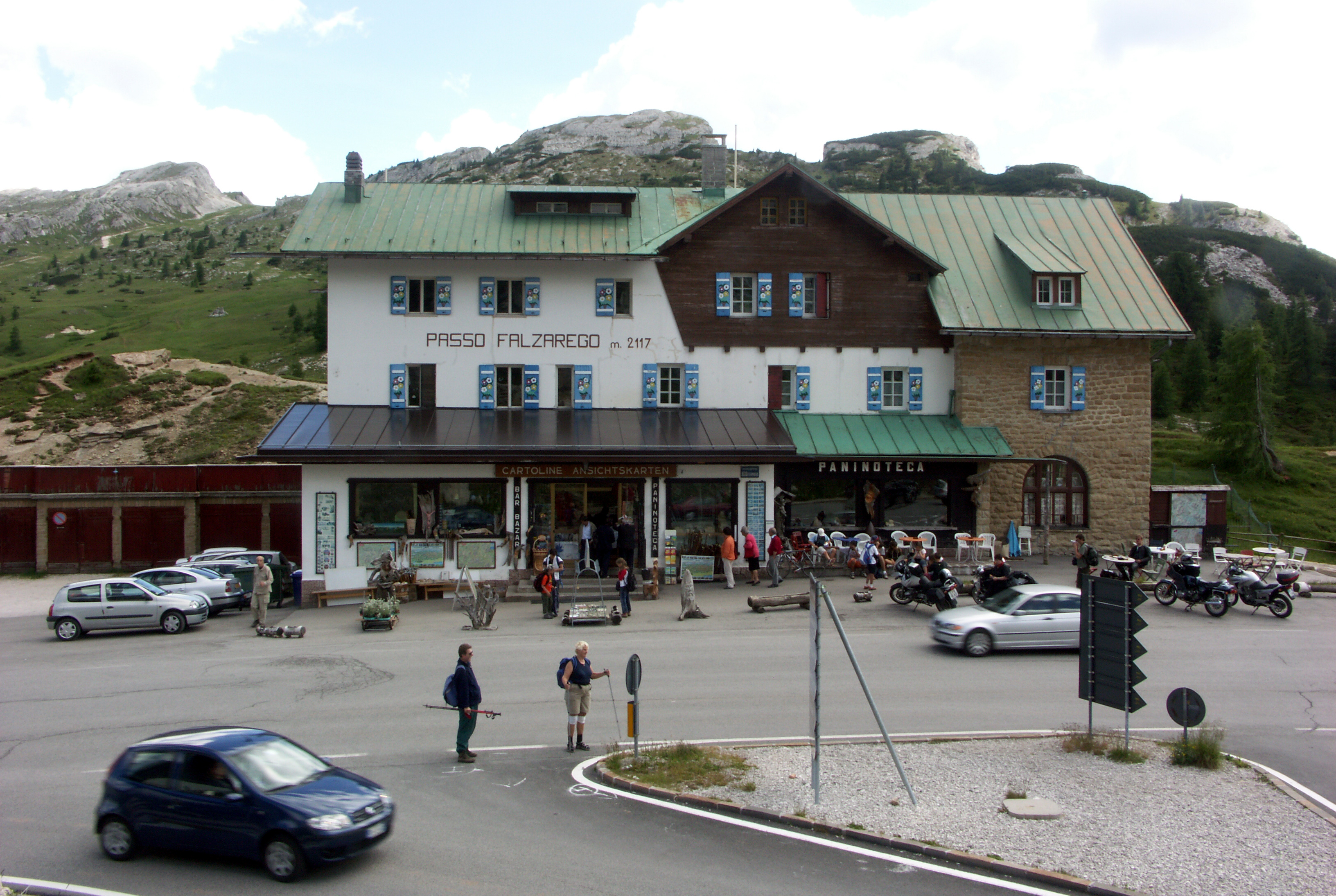 Italien, Südtirol, Baulichkeiten auf dem Falzarego-Pass